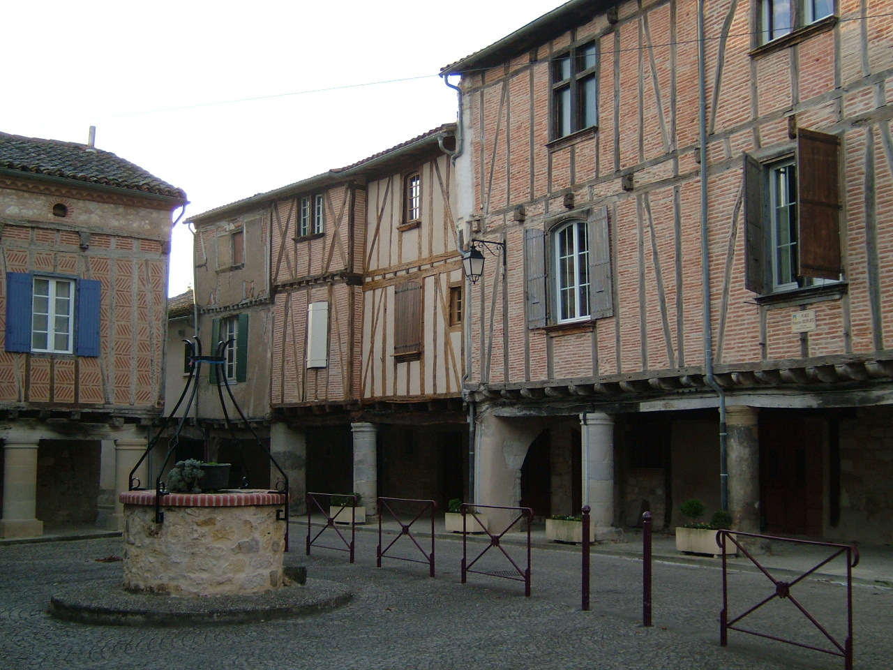 Montdragon (Tarn, France). Maisons à colombage.